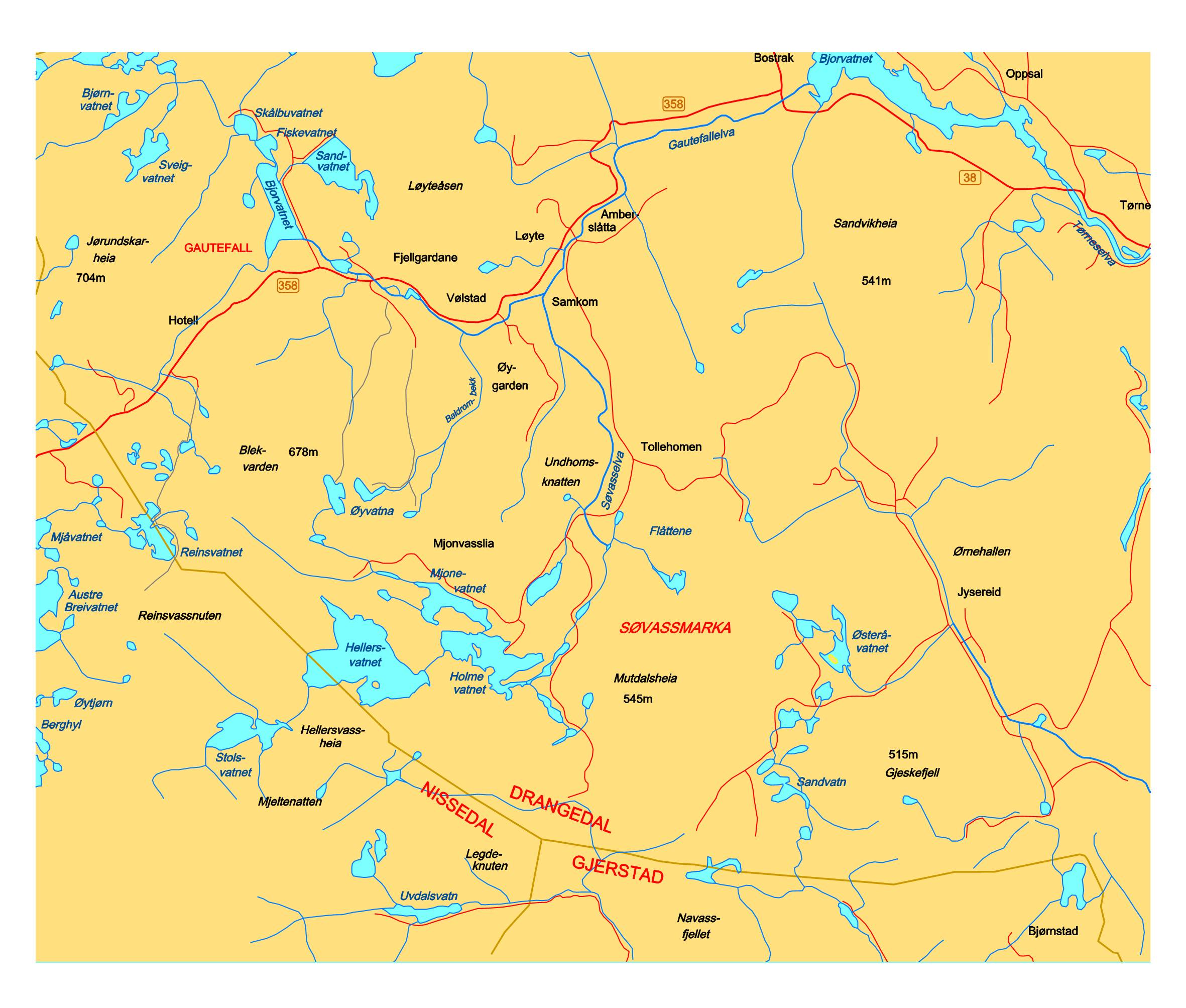 Kart over friluftsområdet Søvassmarka, Drangedal, Telemark, Norway